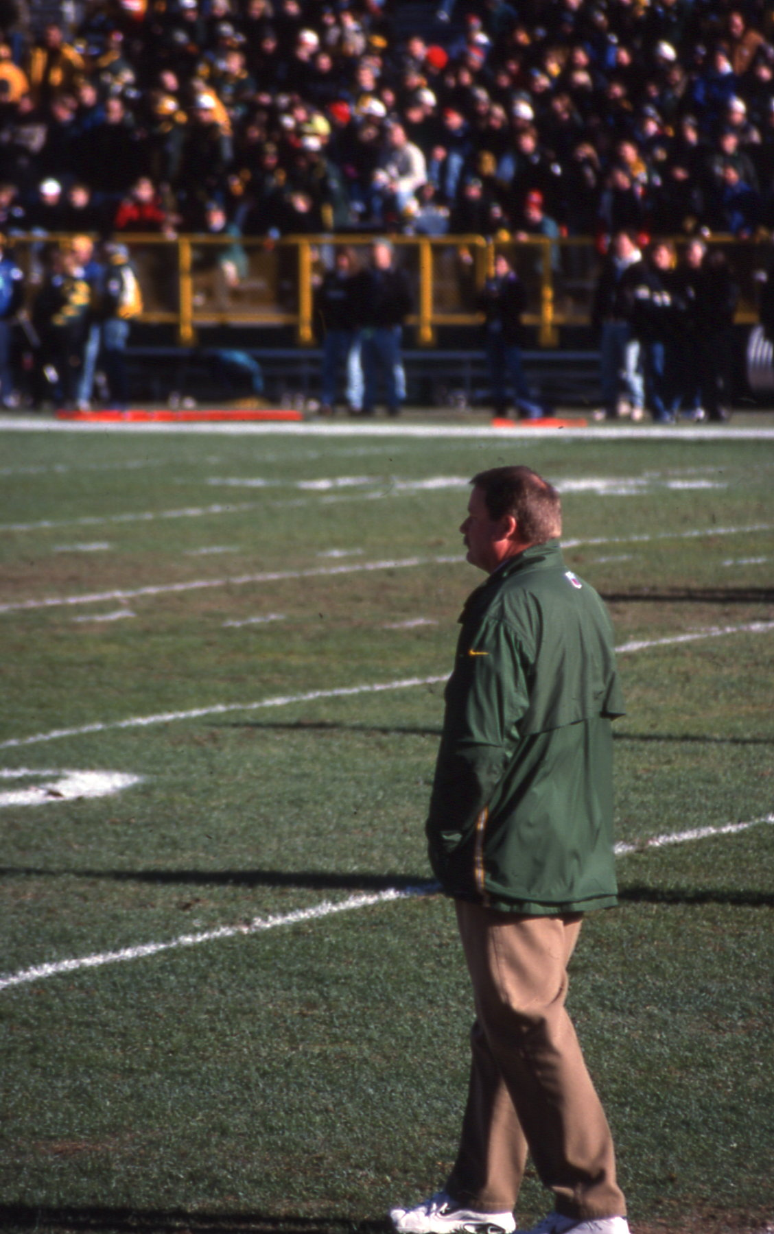 Mike Holmgren in a 1998 Packers game.